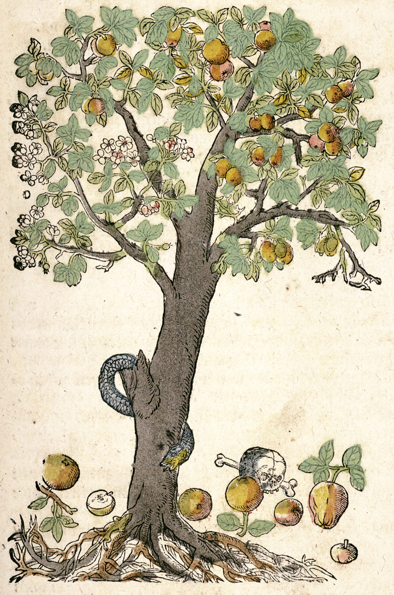 Abbildung aus Hieronymus Bock: Kreütterbuch, Darin underscheidt Nammen und Würckung Kreütter, Stauden, Hecken und Bäumen, mit ihren Früchten, so in Teutschen Landen wachsen ... gemehret, durch ... Melchiorem Sebizium, Straßburg, Josias Rihel, 1595, altkolorierter Holzschnitt von David Kandel (1520-1590)